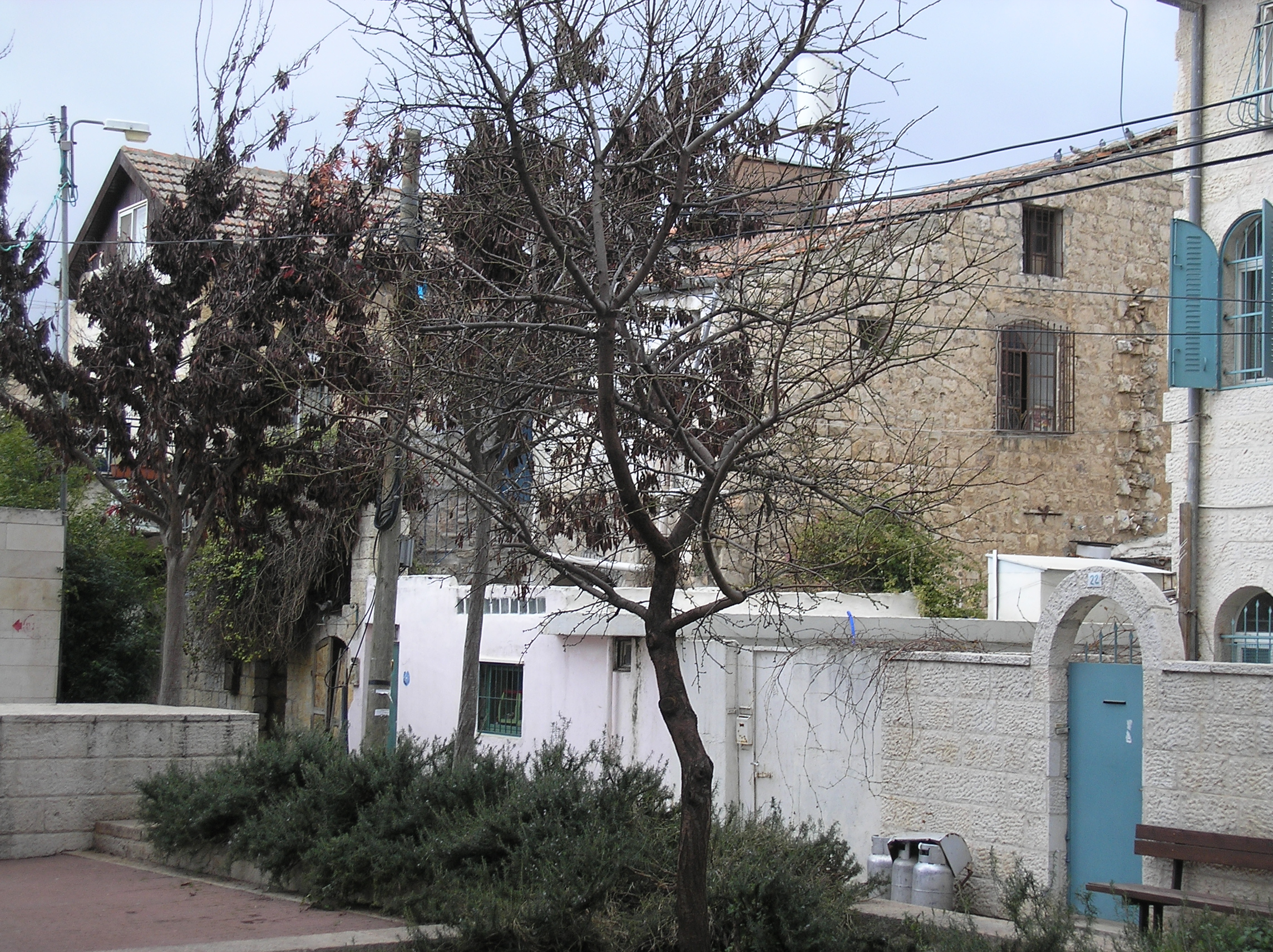 in Mazkeret Moshe in Nahlaot